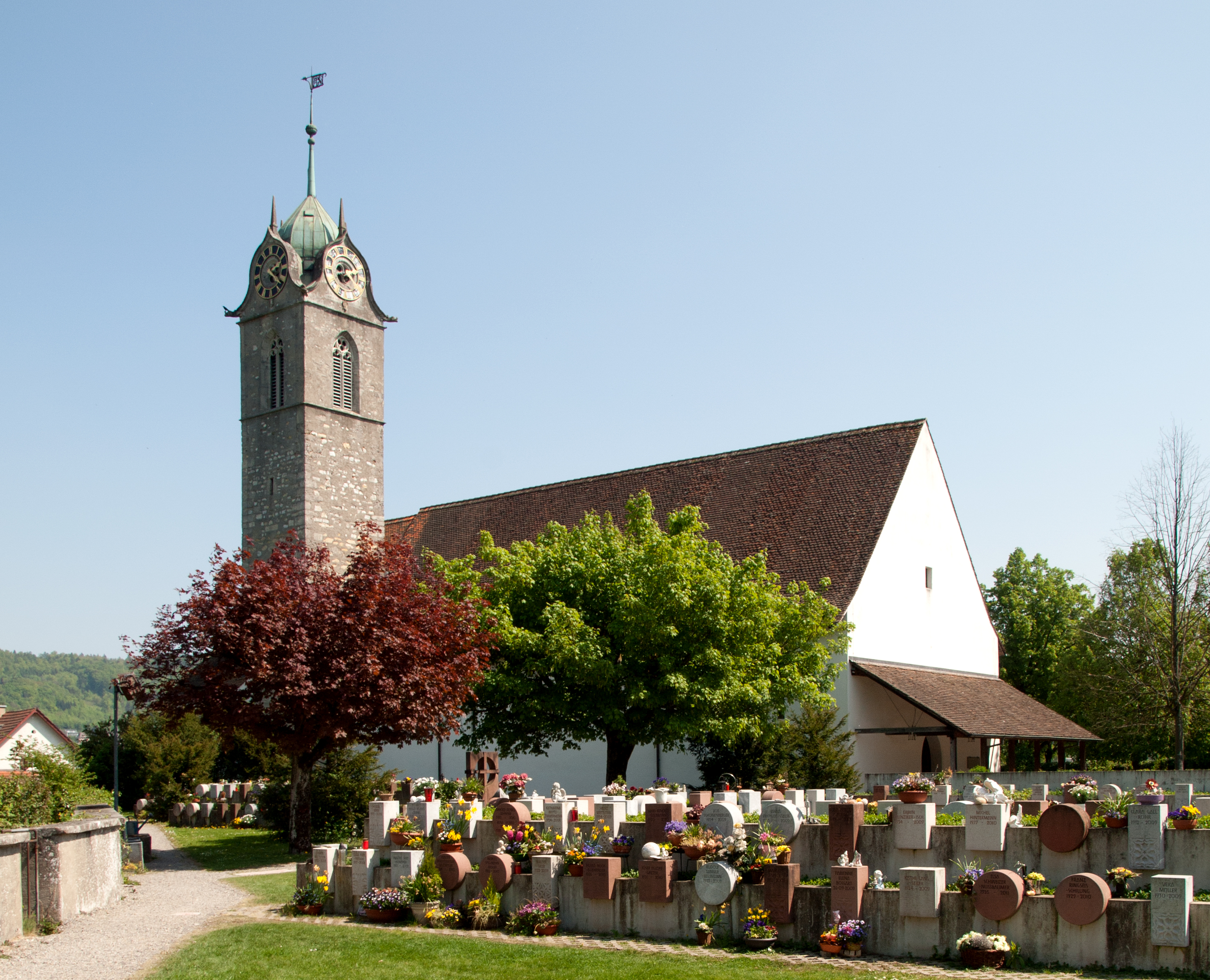 Die Reformierte Kirche von Windisch (gebaut um 1300) Sicht von Westen auf die Kirche